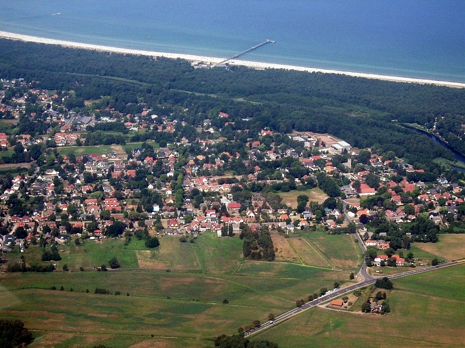 Luftbildaufnahme von Prerow